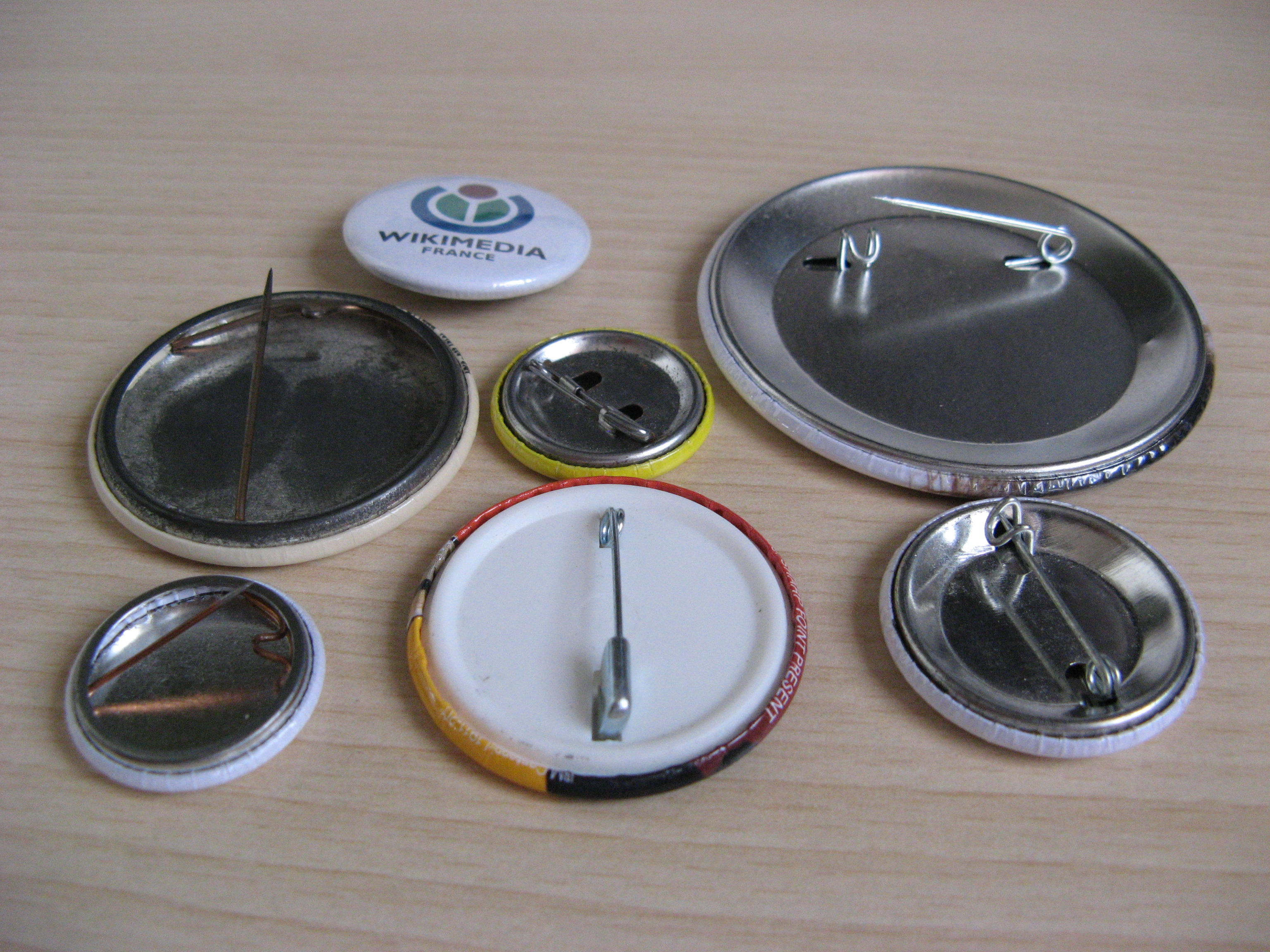 Visualisation des 3 principaux dispositifs d'attaches des badges